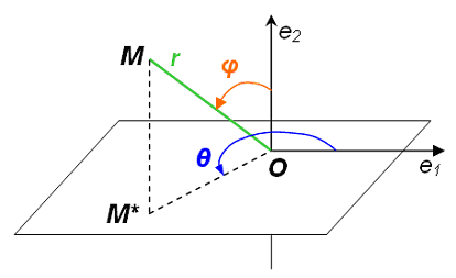 Spherical coordinates. Сферични координати